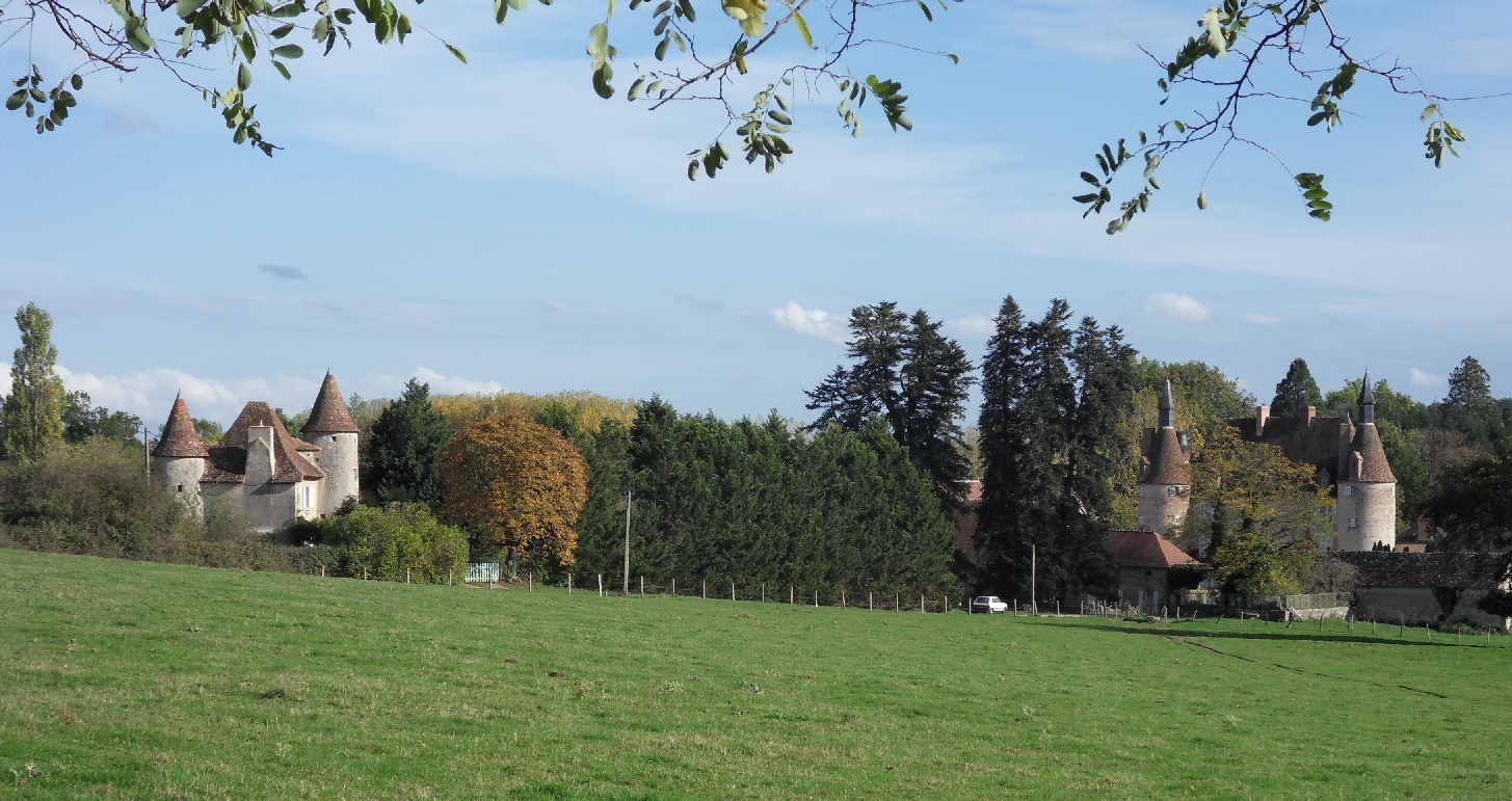 Château de Blanzat (Inscrit) .